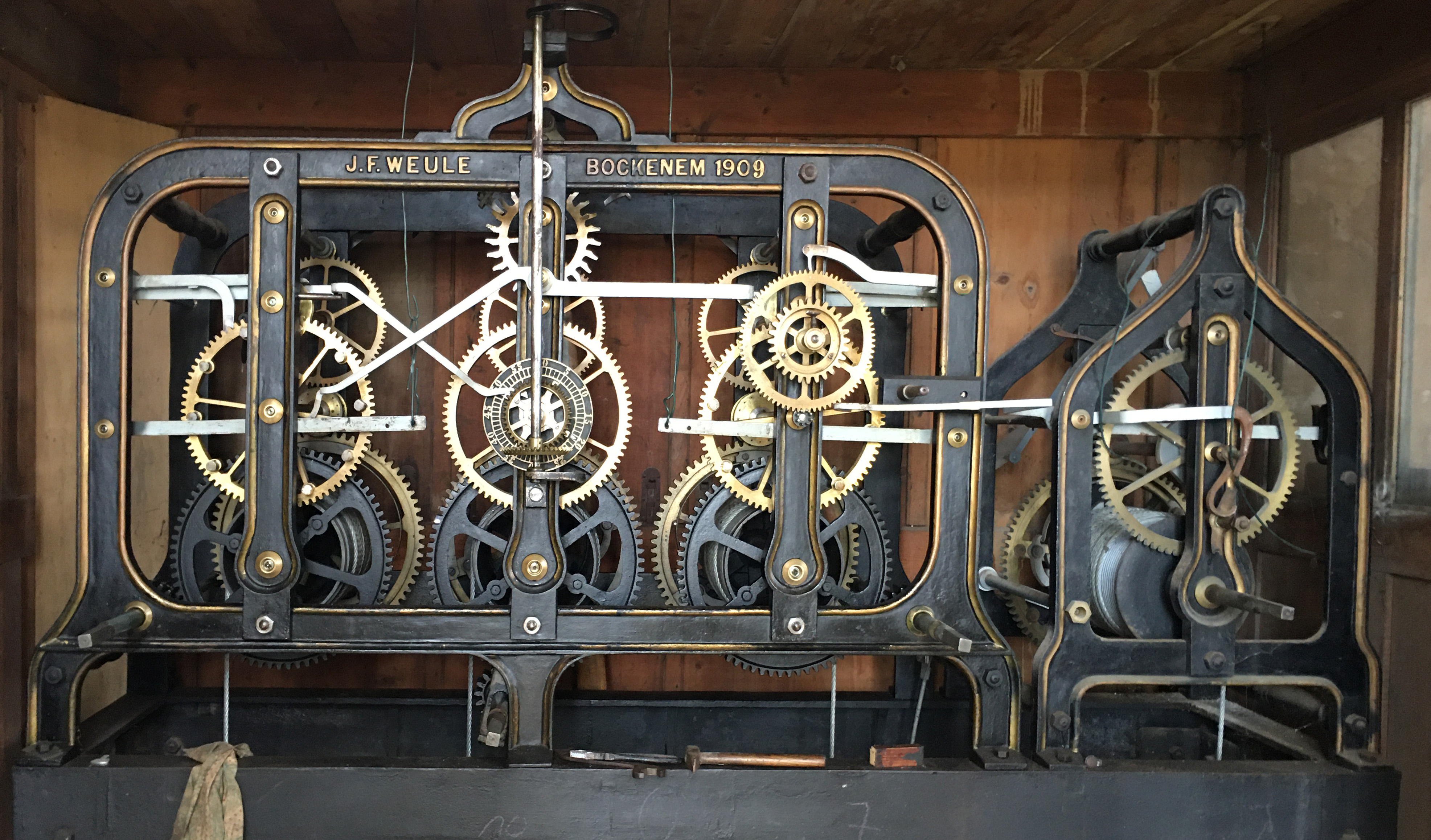 1909 hat die Firma Weule ein neues Uhrwerk im Turm eingebaut. Das rein mechanische Werk wurde 2012 saniert und ist bis heute funktionsfähig. In Gang gehalten wird die Uhr von drei je 130 kg schweren Gewichten, die mit Kurbeln hochgezogen werden. Das Uhrwerk betreibt auch die Glocken zum Stundenschlag.